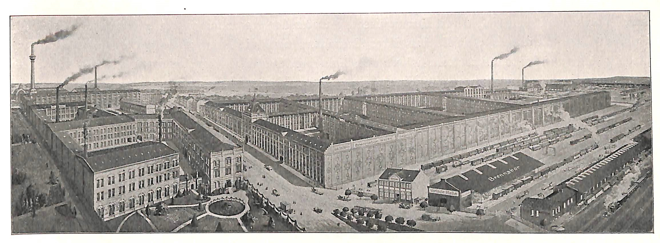 Brandenburg - (fiktive) Ansicht der Brennabor-Werke.